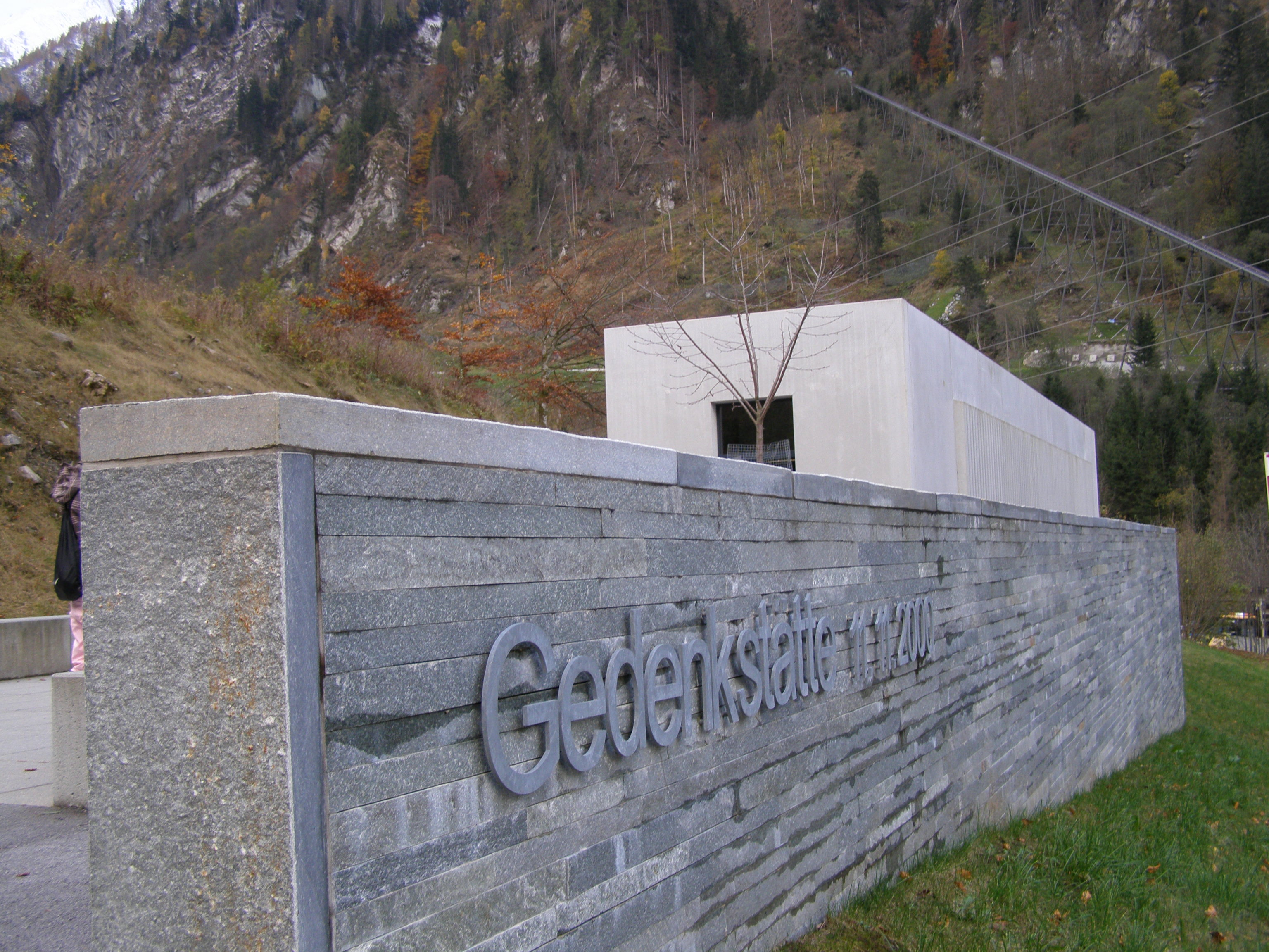 Gedenkstätte zum Andenken an den Gletscherbahnunfall in Kaprun 2000